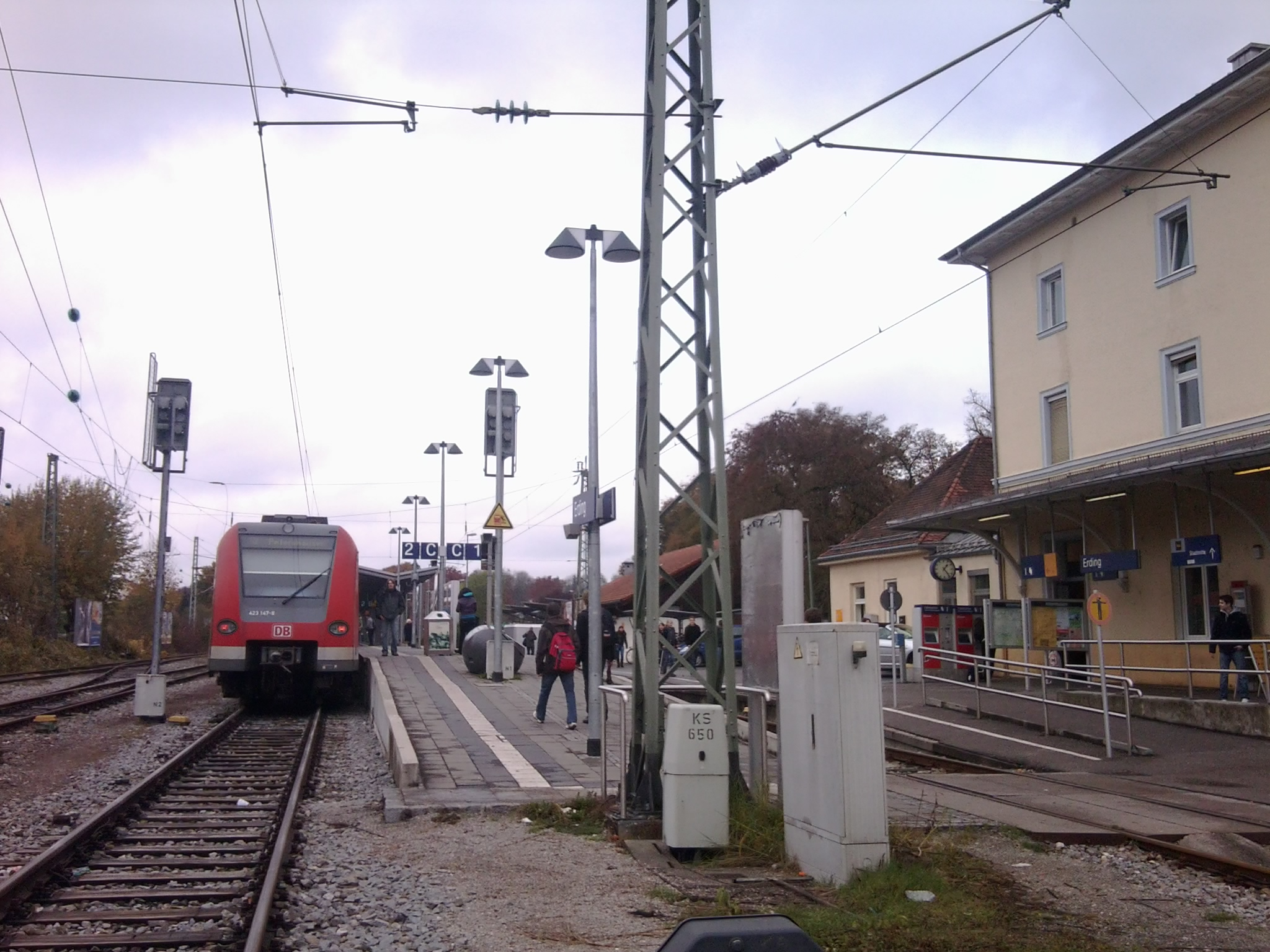 Bahnhof Erding mit S-Bahnsteig und Bahnhofsgebäude